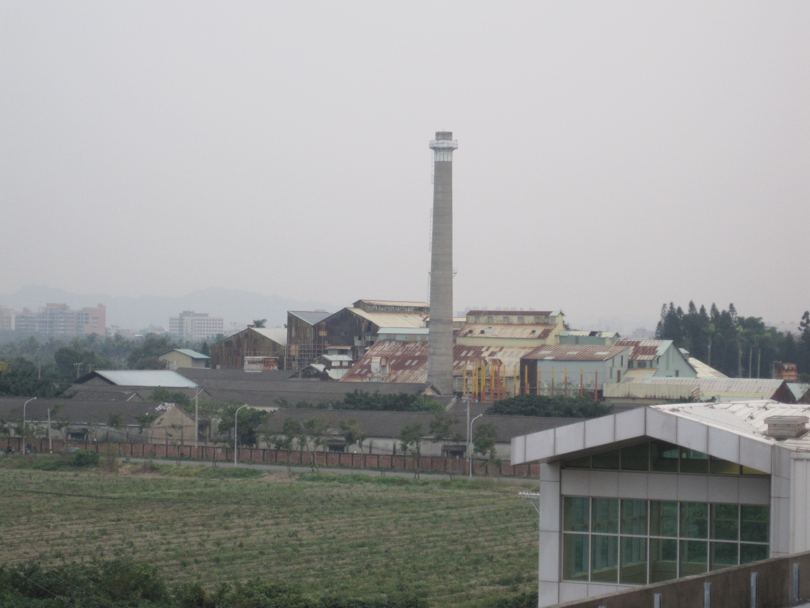 中文（台灣）: 橋頭糖廠。